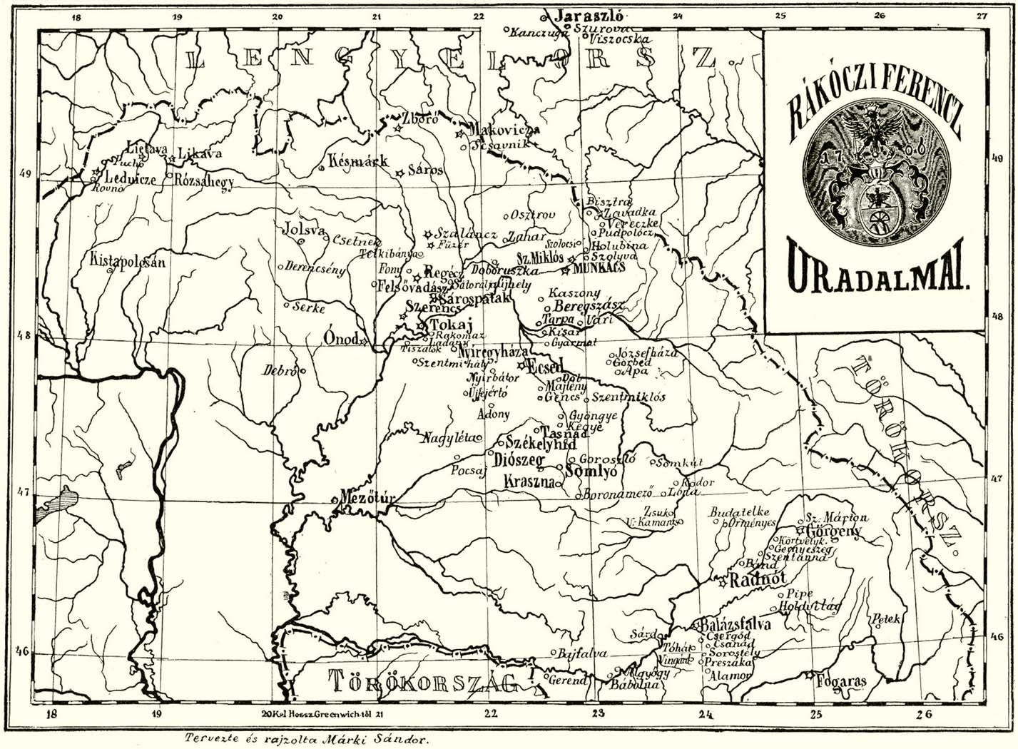 DR. Márki Sándor II. Rákóczi Ferencz című művének illusztrációja